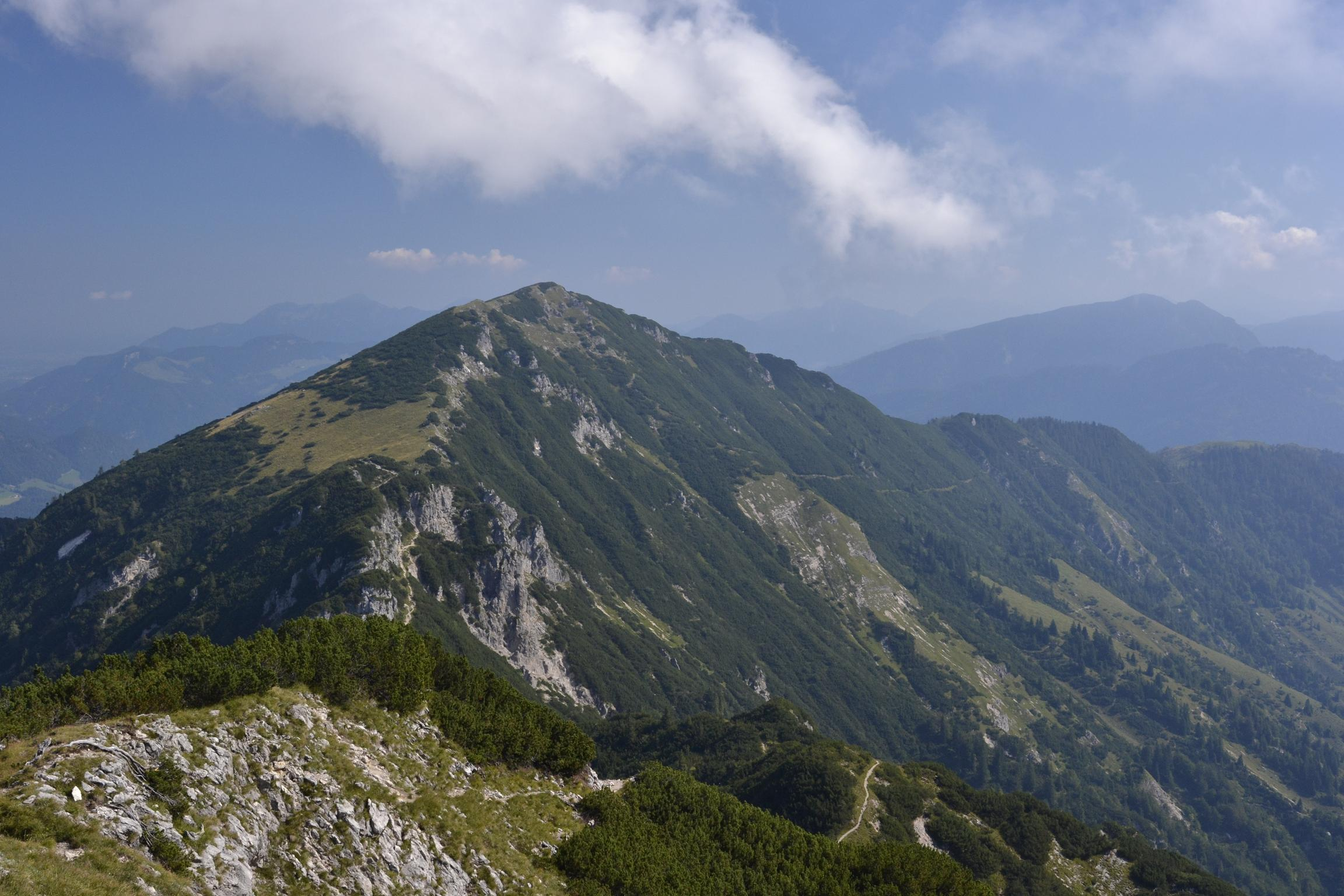 Feldberg vom Stripsenkopf aus gesehen